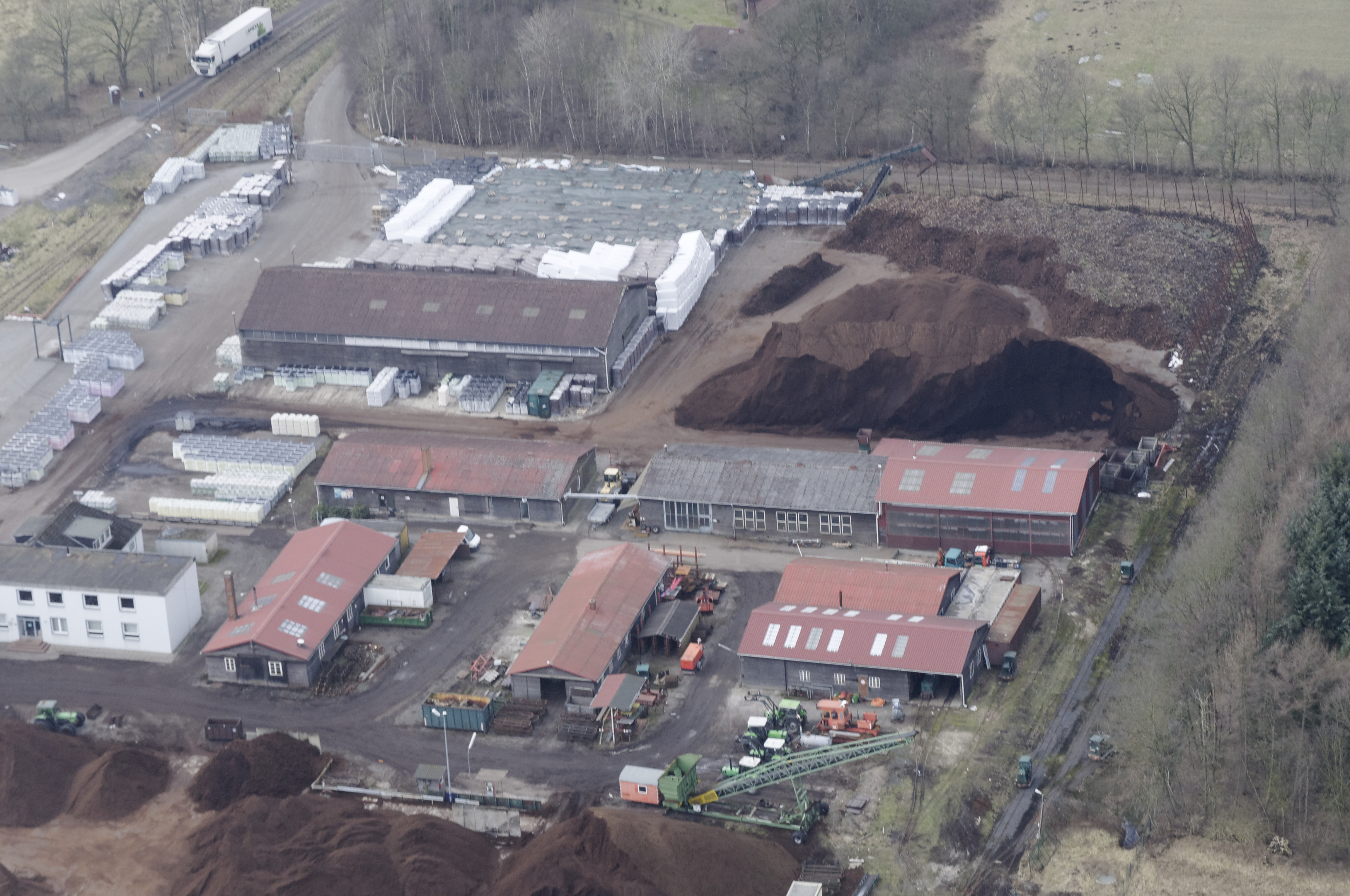 Luftaufnahme: Torfwerk Gnarrenburg